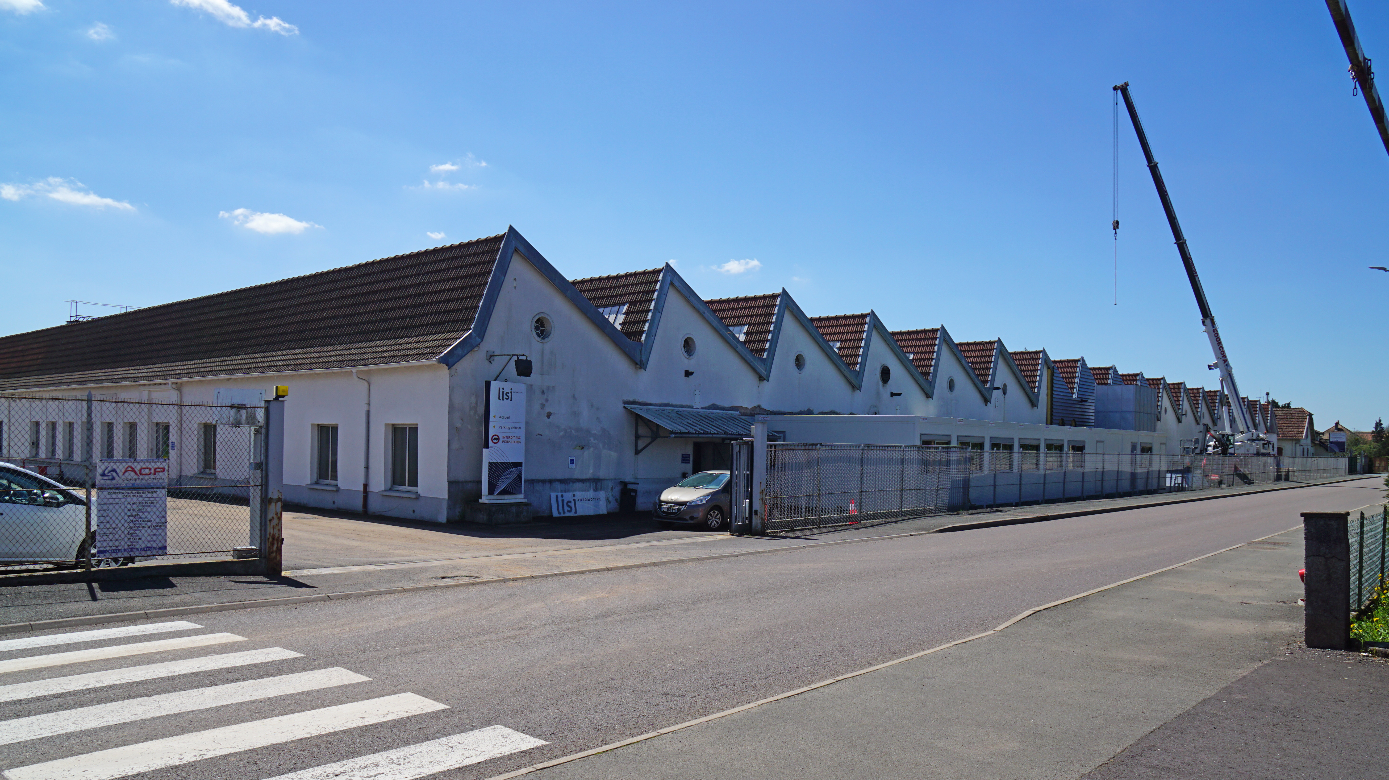 L'usine Lisi Automotive à Mélisey.